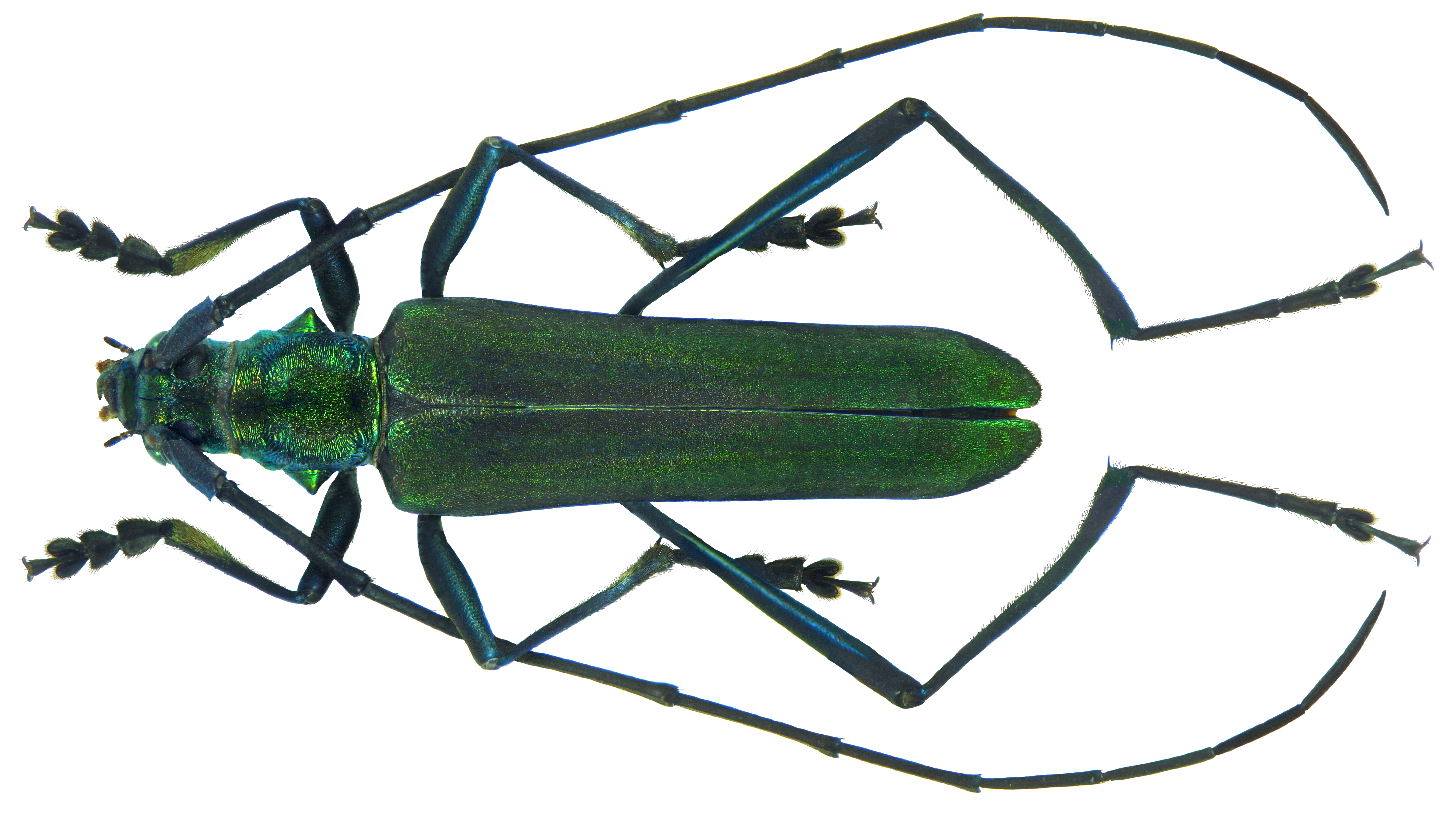 Familie: Cerambycidae Groesse: 18,2 mm Fundort: Laos, Hua Phan Prov., Phou Pan (Mt.) 1500-1900 m leg. C.Holzschuh, 17.V.-3.VI. 2007; det. A.Skale, 2012 Photo: U.Schmidt, 2013